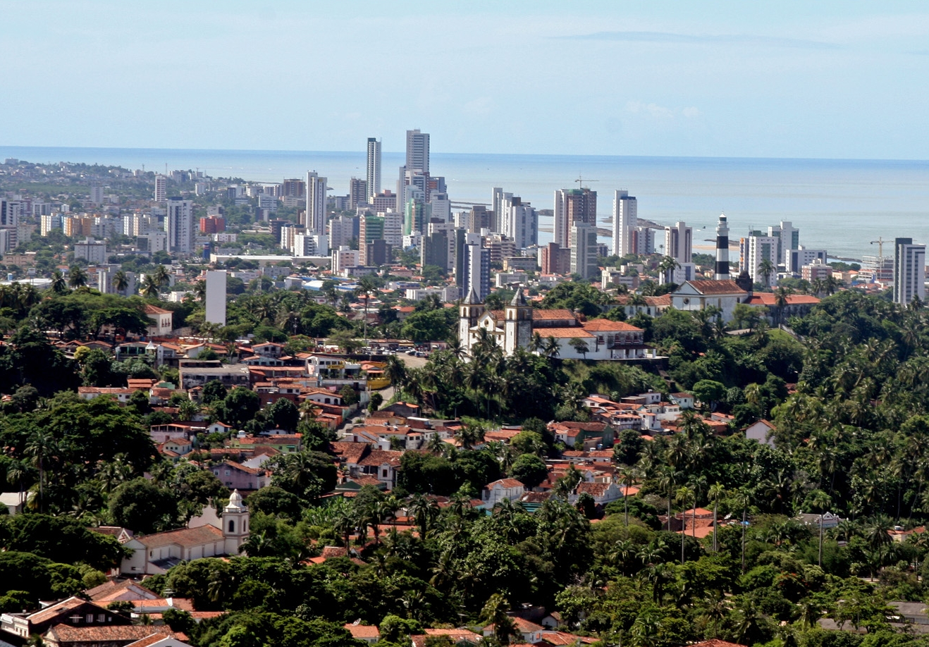 Vista Aérea do Sítio Histórico de Olinda - Olinda - Pernambuco - Brasil